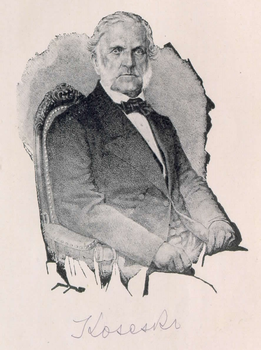 Jovan Vesel Koseski (1798–1884), Slovene poet and jurist.